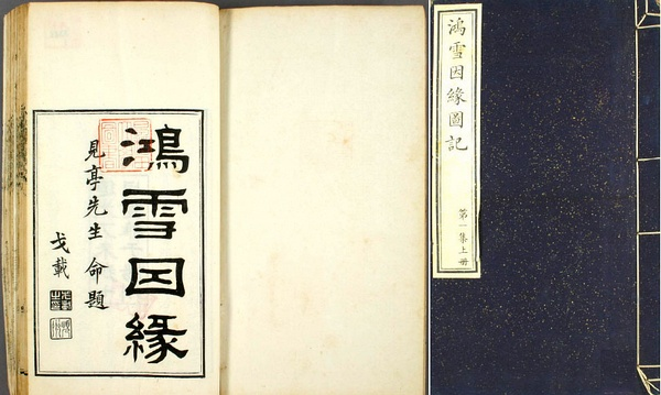 清道光年版 鴻雪因緣圖記